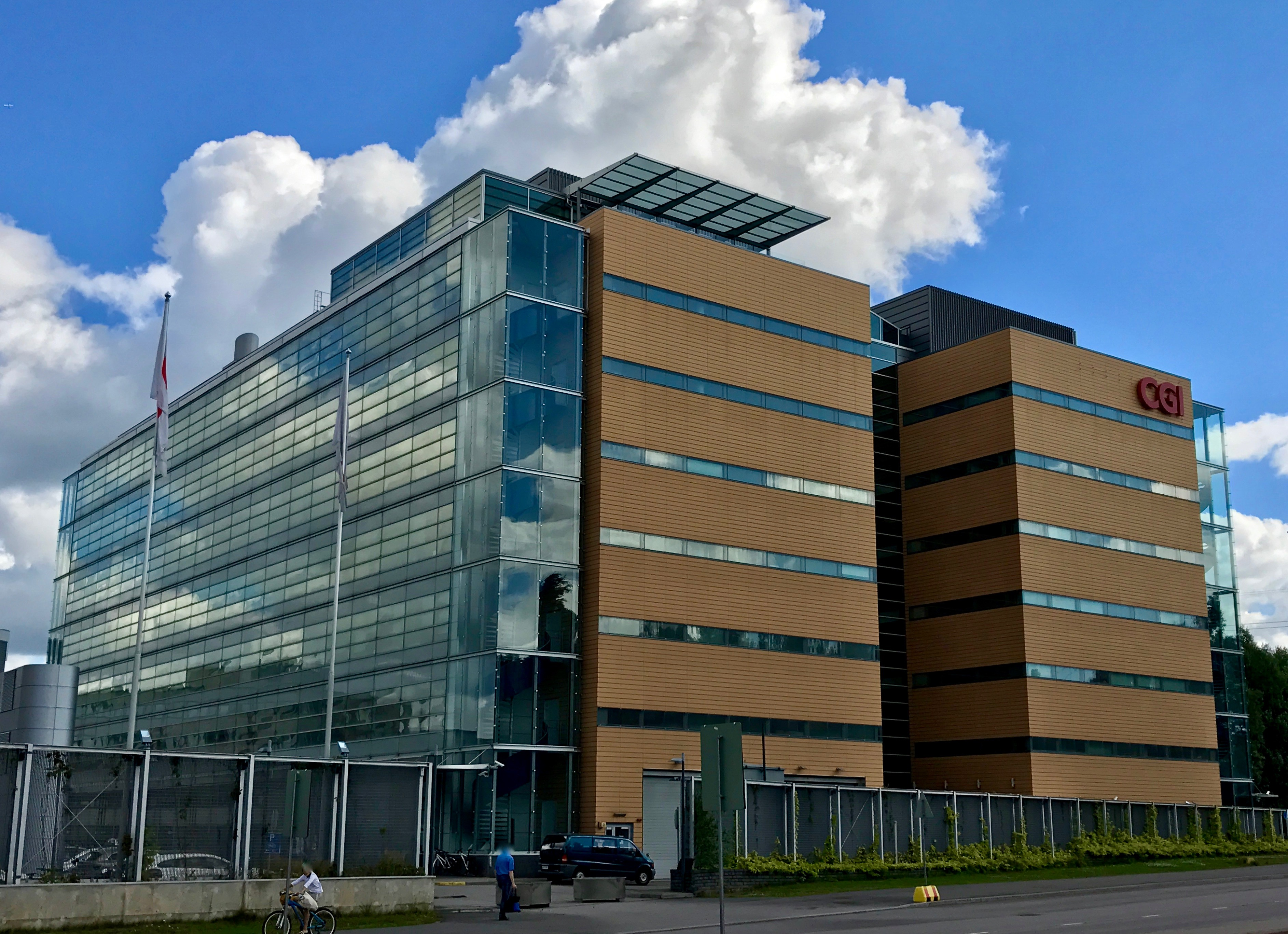 CGI Suomen pääkonttori Helsingin Pitäjänmäellä.